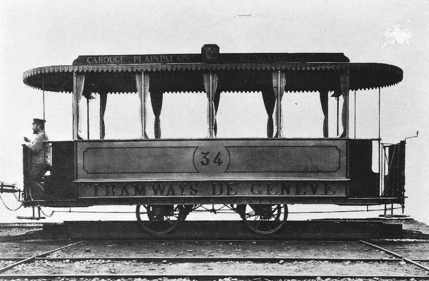 Voiture 34 des Tramways de Genève